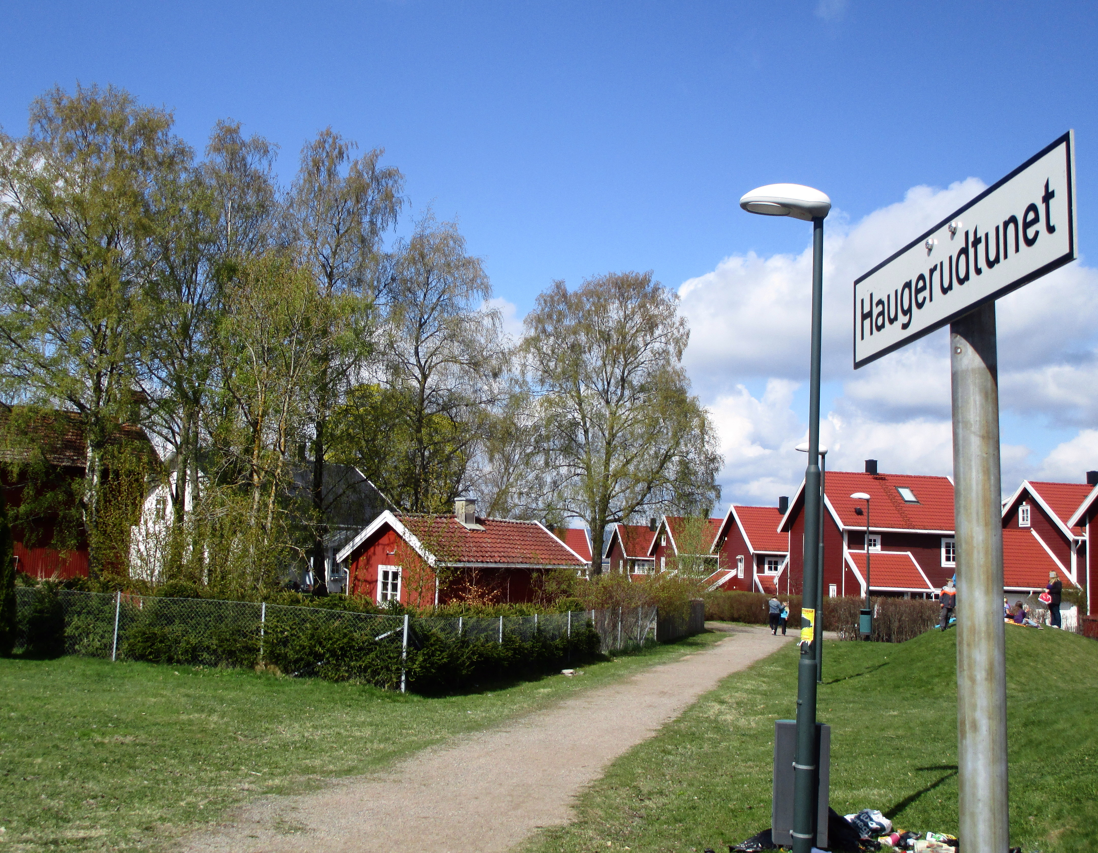 Haugerudtunet i Oslo. Foto: Stig Rune Pedersen.